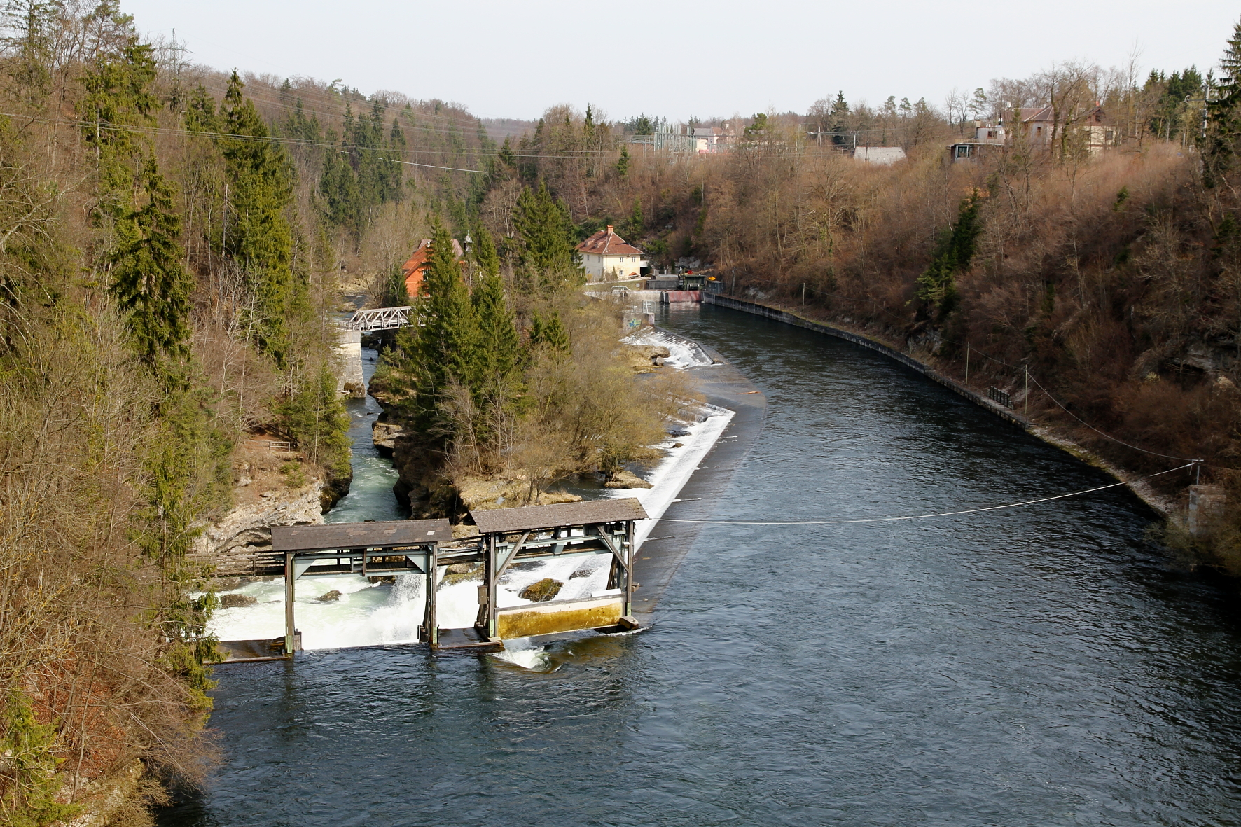 Der Traunfall von oberhalb, von der Traunfallbrücke aus gesehen. Blickrichtung Nord.